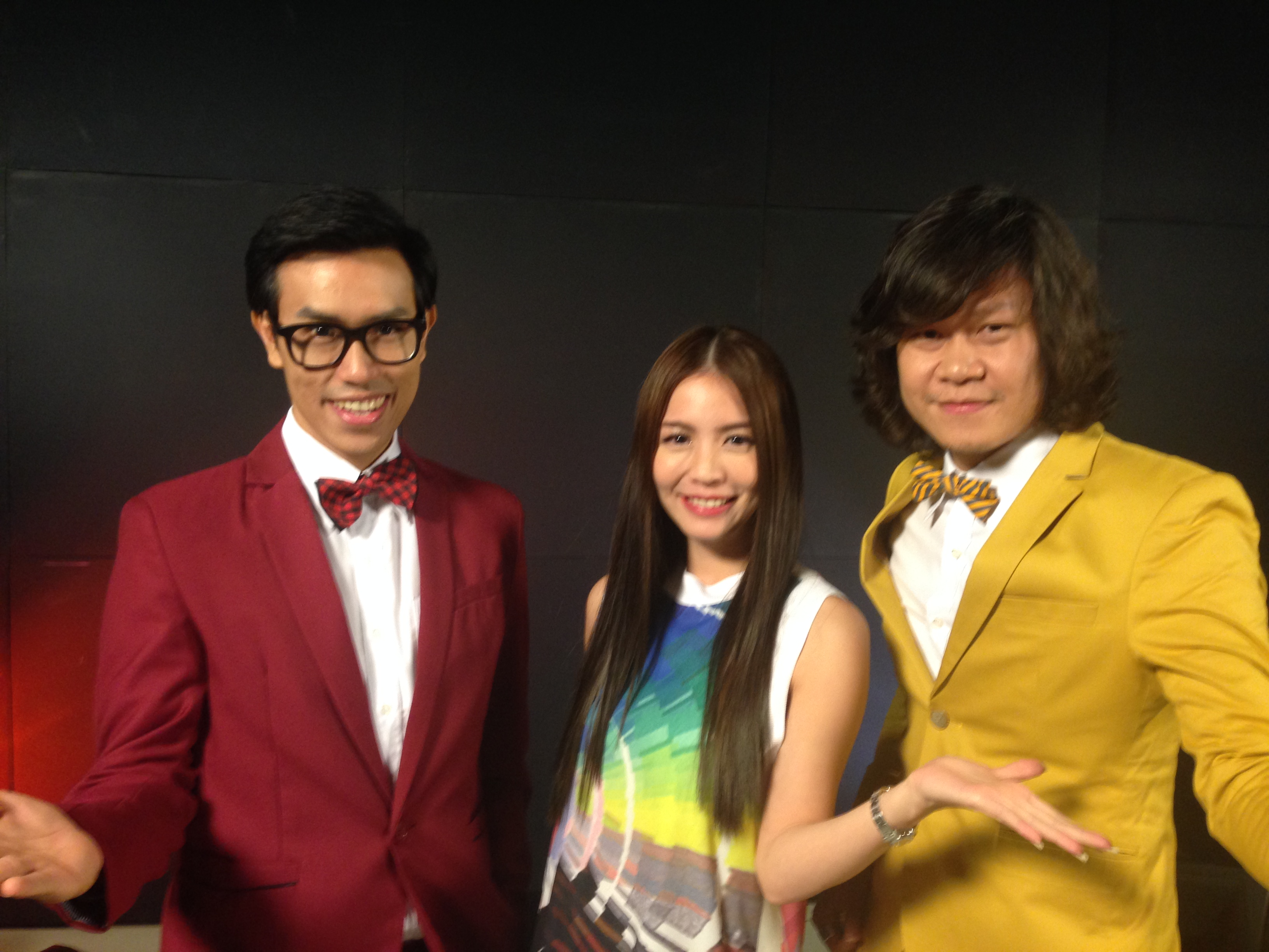 La Ong Fong at VERY TV.